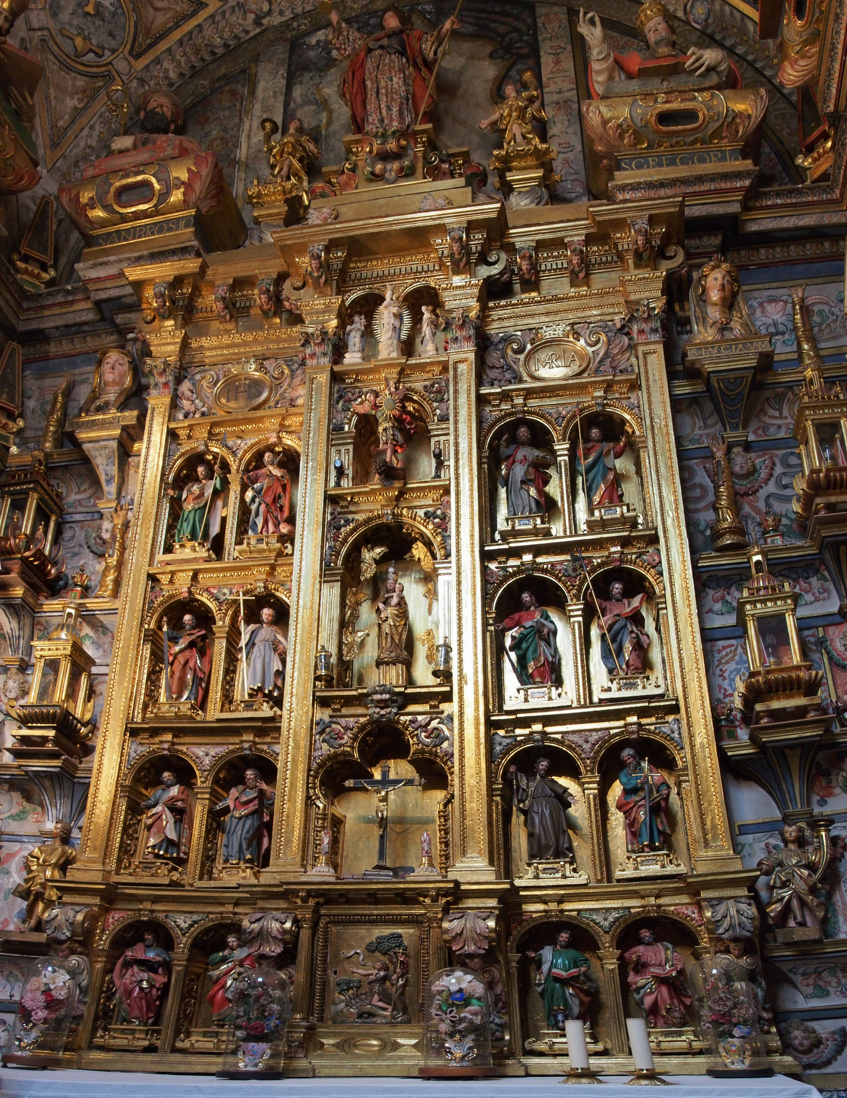 Retablo relicario en la iglesia de San Miguel y San Julián (Valladolid), de la escuela de Gregorio Fernández.